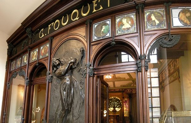 Façade de la boutique du bijoutier Georges Fouquet située 6 rue Royale à Paris et conçue en 1901 par Mucha, maitrise d'oeuvre de la réalisation par la maison Jansen qui fit appel à Léon Fargues pour les vitraux, démontée en 1923, musée Carnavalet (Paris)